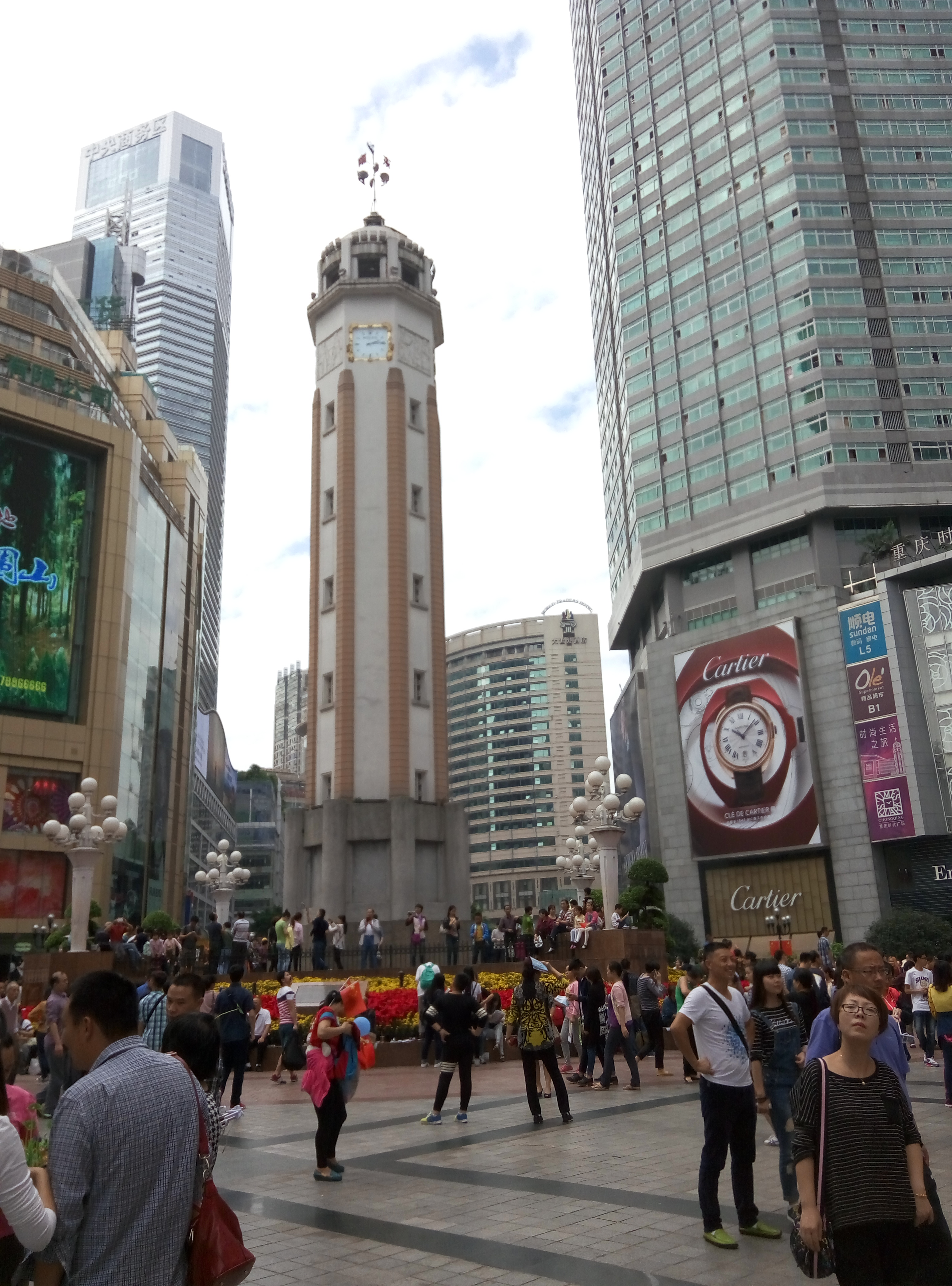 粵語: 重慶解放碑 日頭